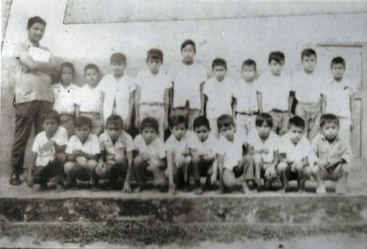 Waldemar Soria con sus alumnos del Barrio de Ancohallo en la ciudad de Lamas, Departamento de San Martín en 1970